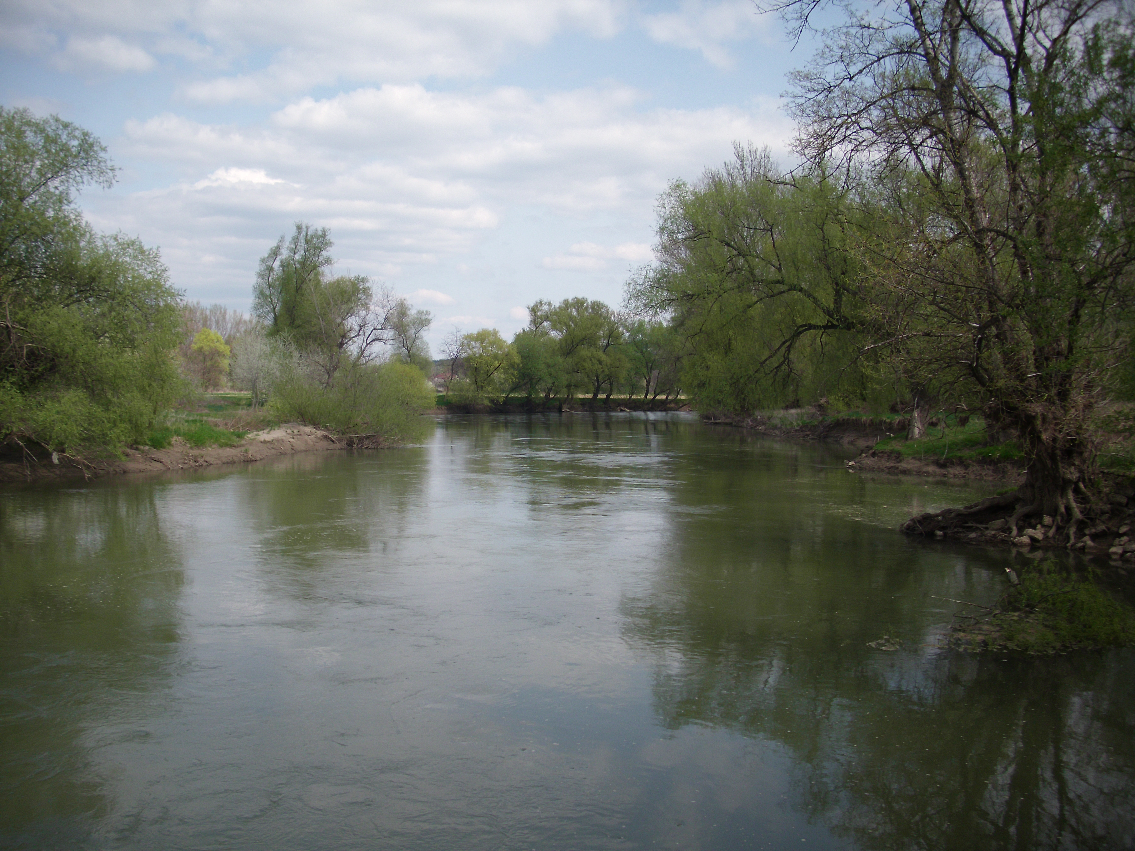 Hernád